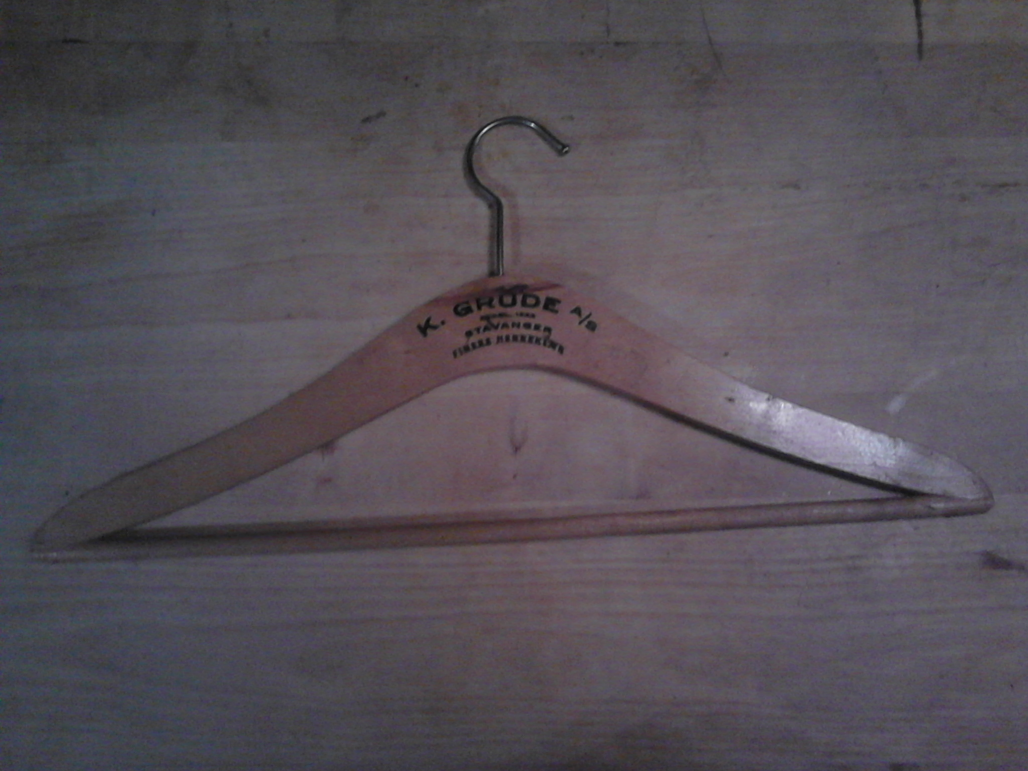 Kleshenger fra K. Grude A/S herrekonfeksjonsfabrikk